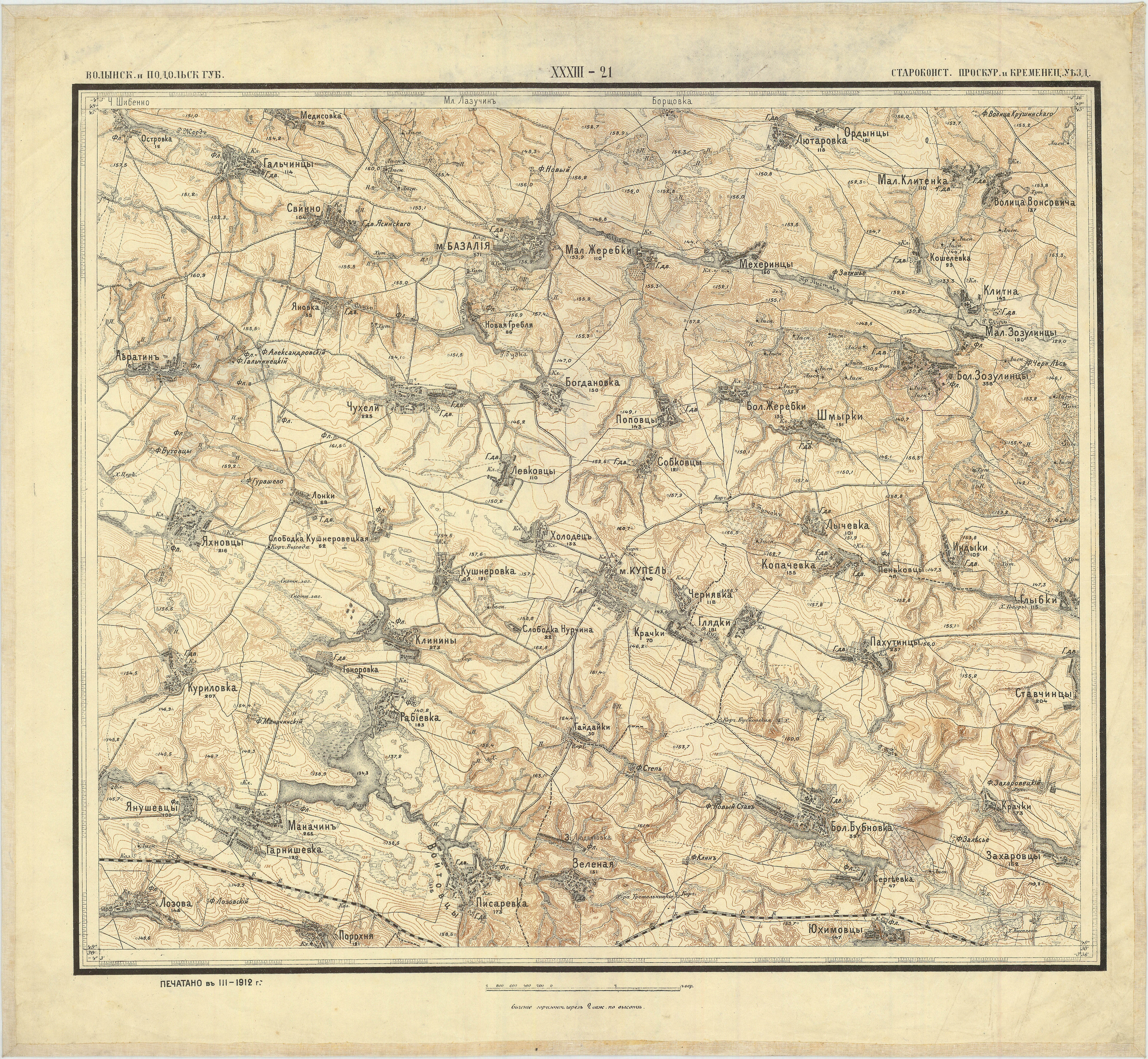 Военно-топографическая карта XXXIII-21. Базалия, Купель (1912)